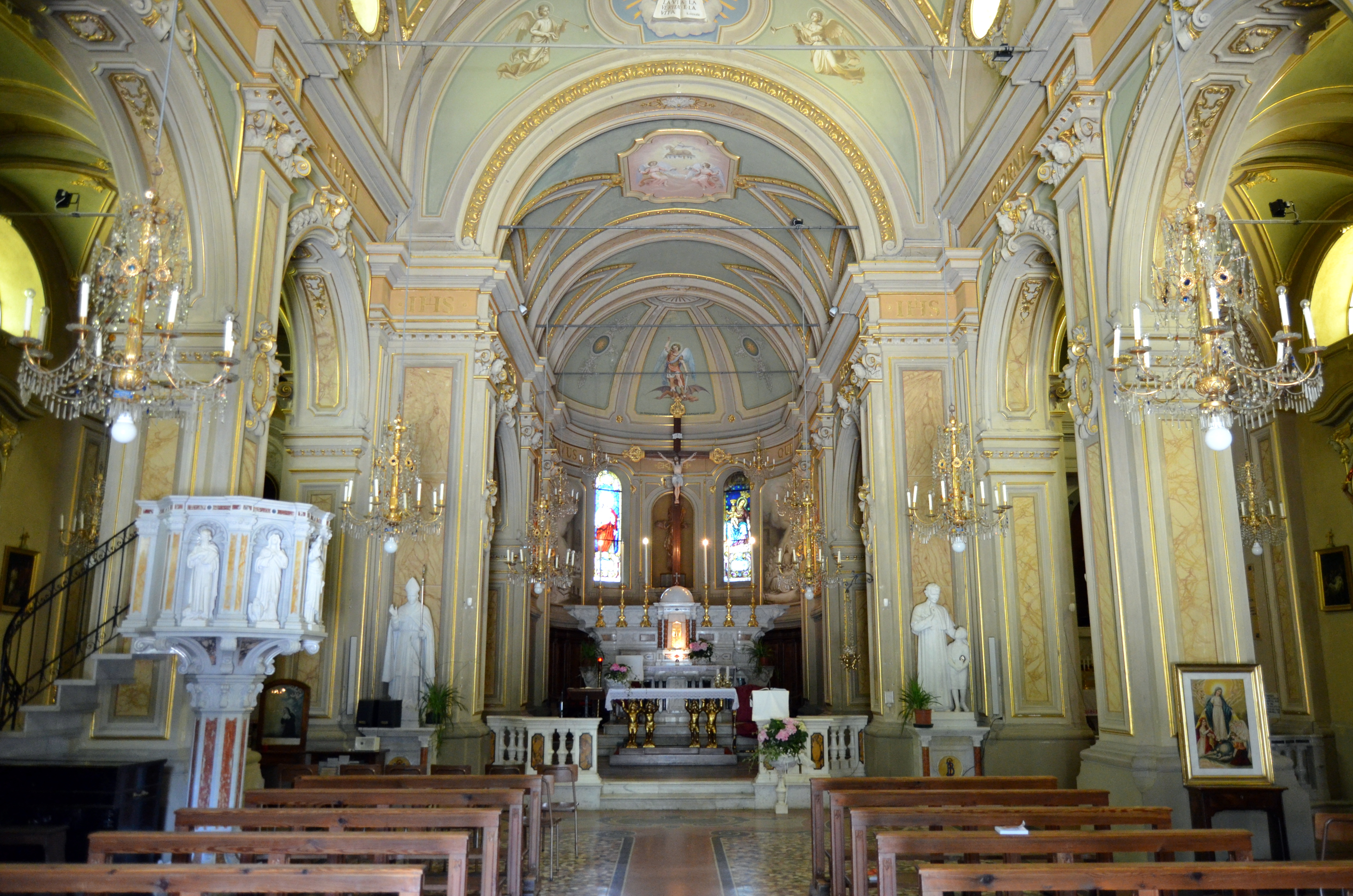 La navata della chiesa di San Michele Arcangelo, Rezzoaglio, Liguria, Italia